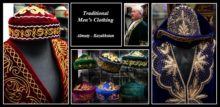 Kazakh Clothing